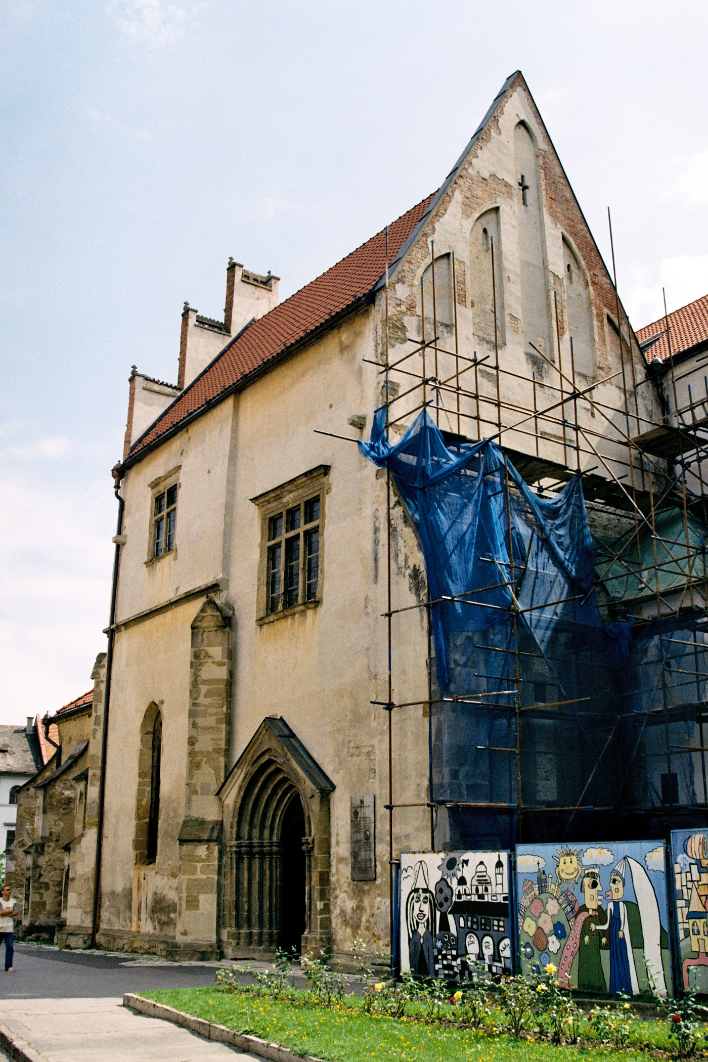 Chrám svätého Jakuba - Severná predsieň a Kaplnka sv.Juraja Kościół św. Jakuba - północna kruchta i kaplica św. Jerzego